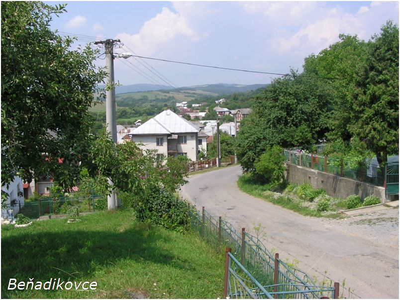 Celkový pohľad na Beňadikovce